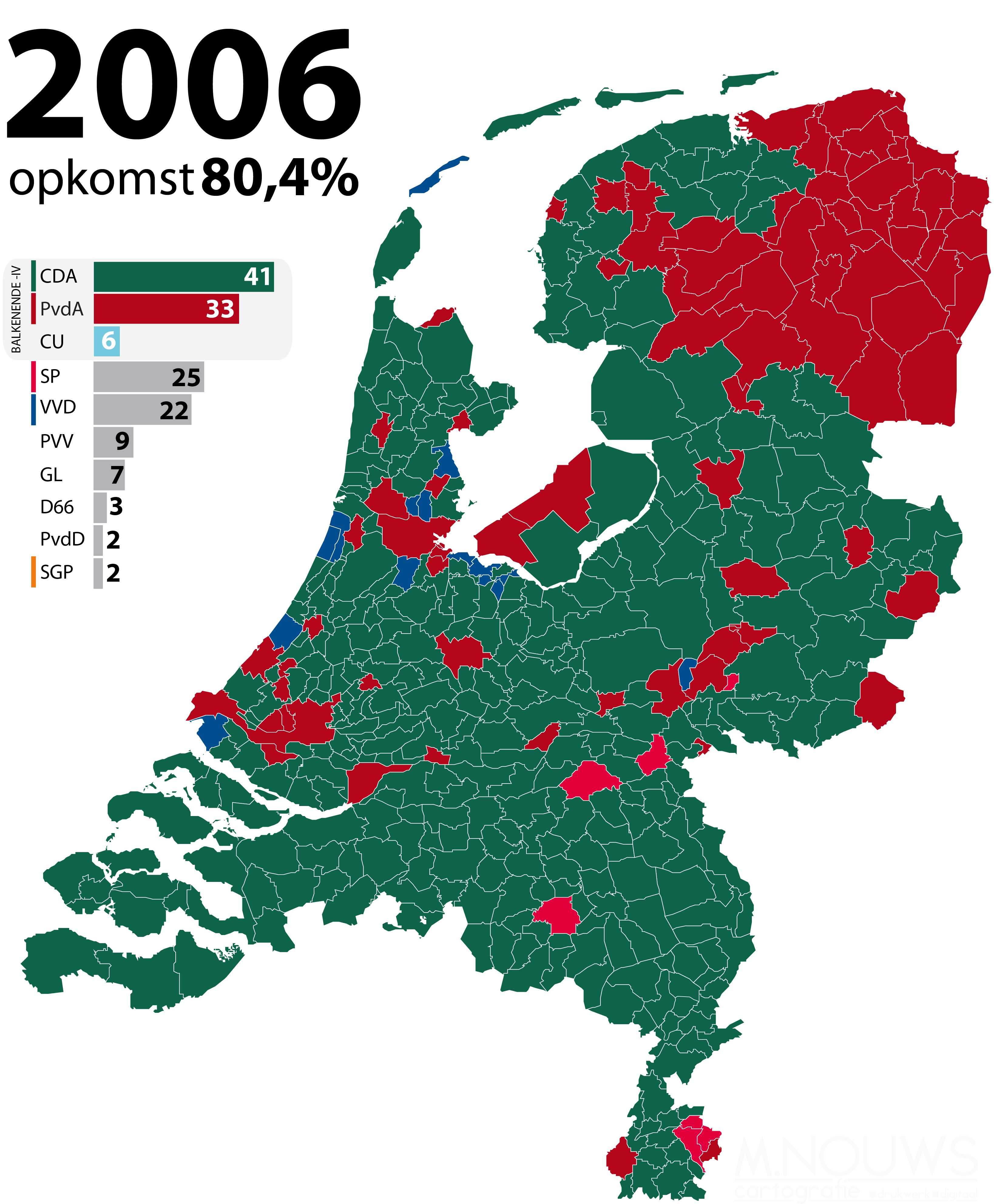 Grootste politieke partij per gemeente, zetelverdeling en kabinetscoalitie bij Tweede Kamerverkiezingen 2006